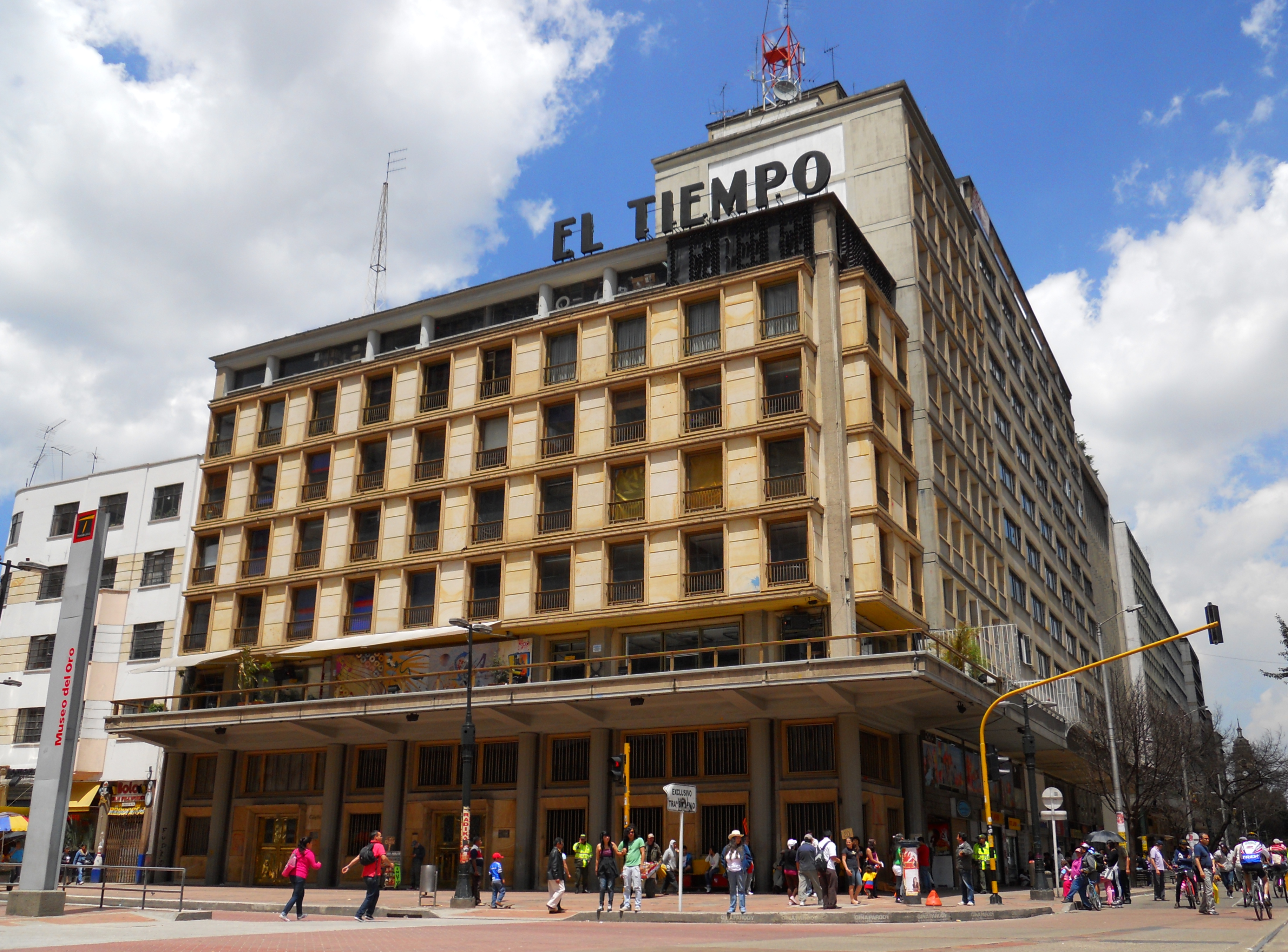 Edificio El Tiempo Bogotá. Carrera Séptima con la avenida Eje Ambiental.